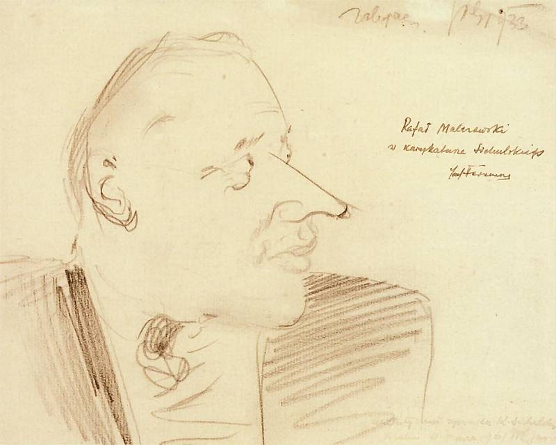 Karykatura Rafała Malczewskiego 1923. Ołówek, papier. 18,2 x 21,7 cm Własność prywatna.